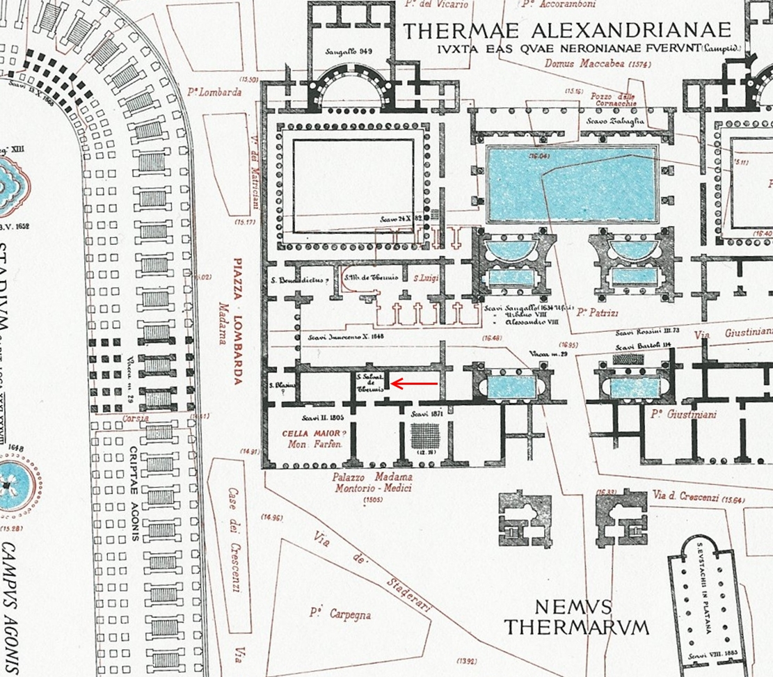 Pianta di Lanciani